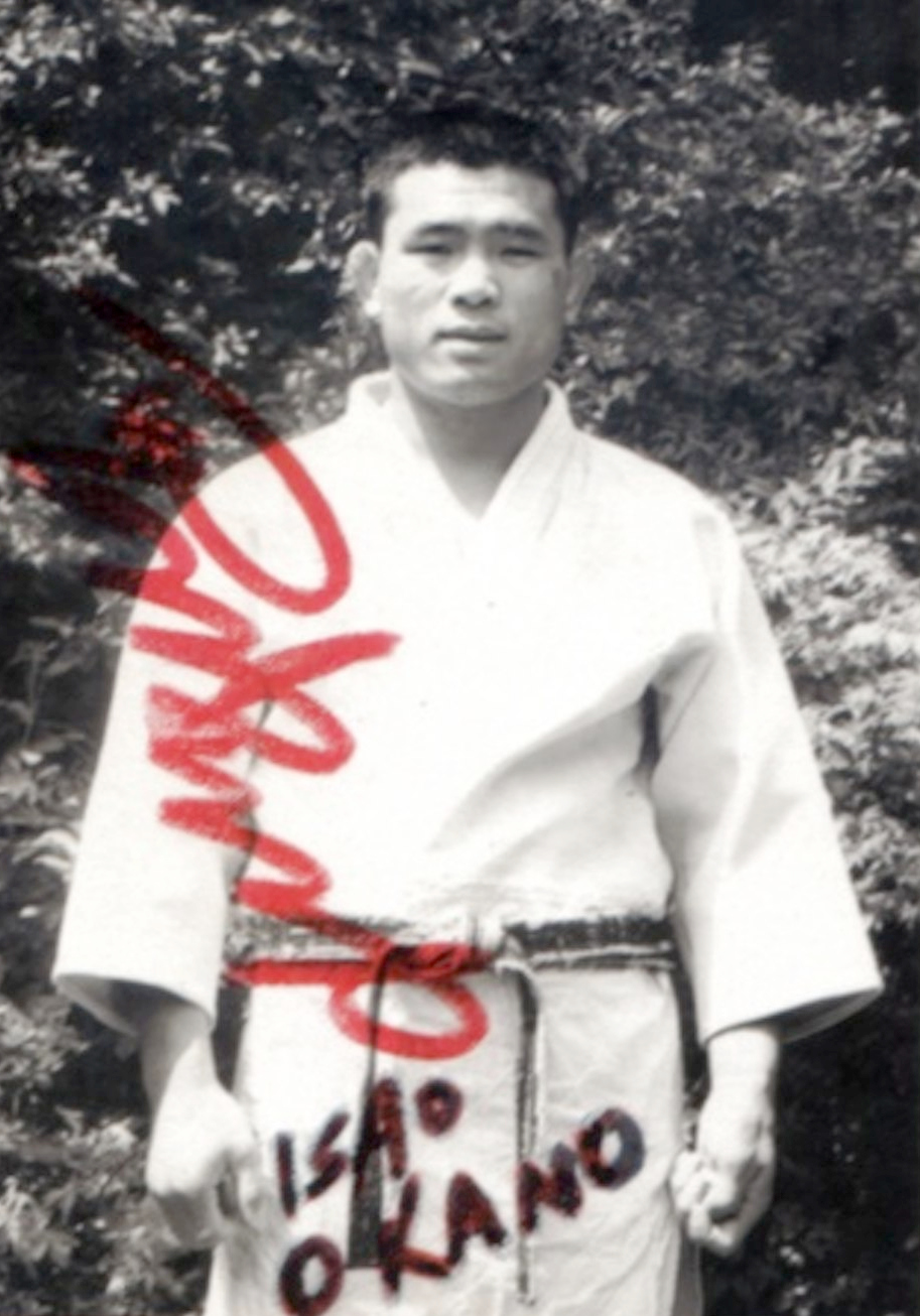 Isao Okano